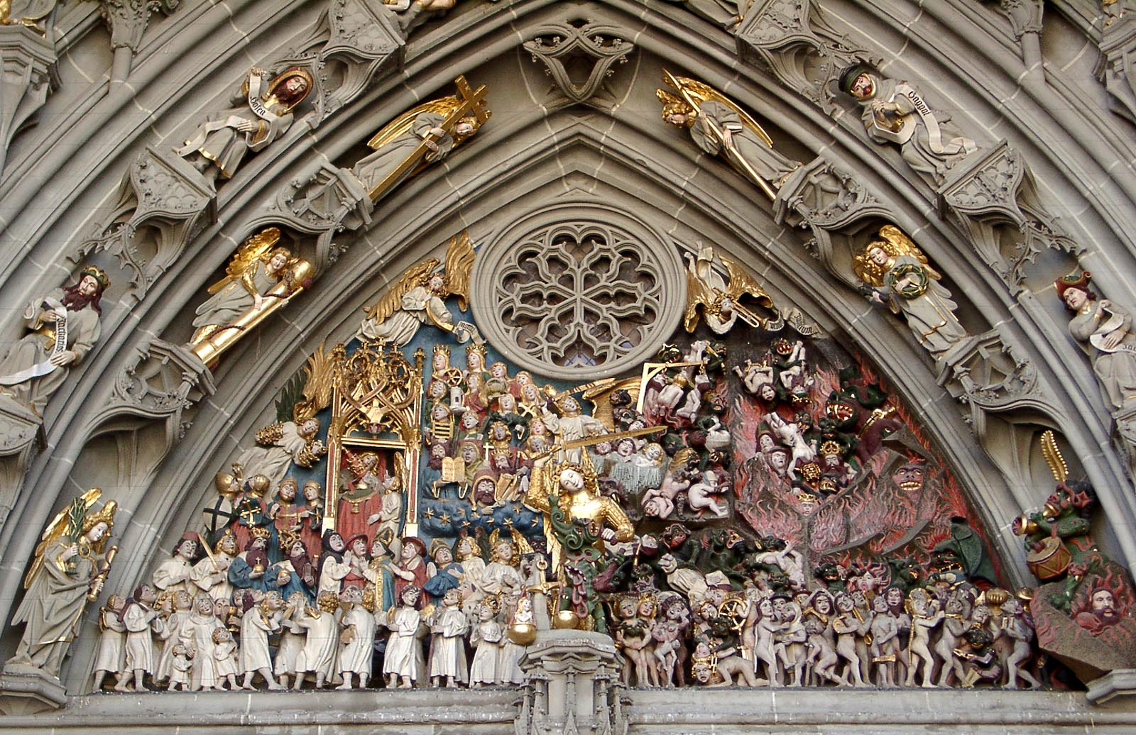 Tympanon des Hauptportales des Berner Münsters (Schweiz) Jüngstes Gericht von Erhart Küng, letztes Drittel 15. Jh.